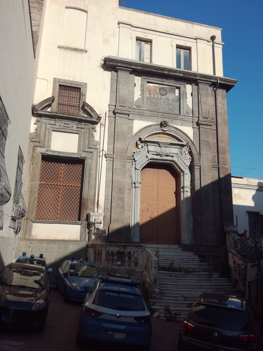 Trinità delle Monache (Napoli)